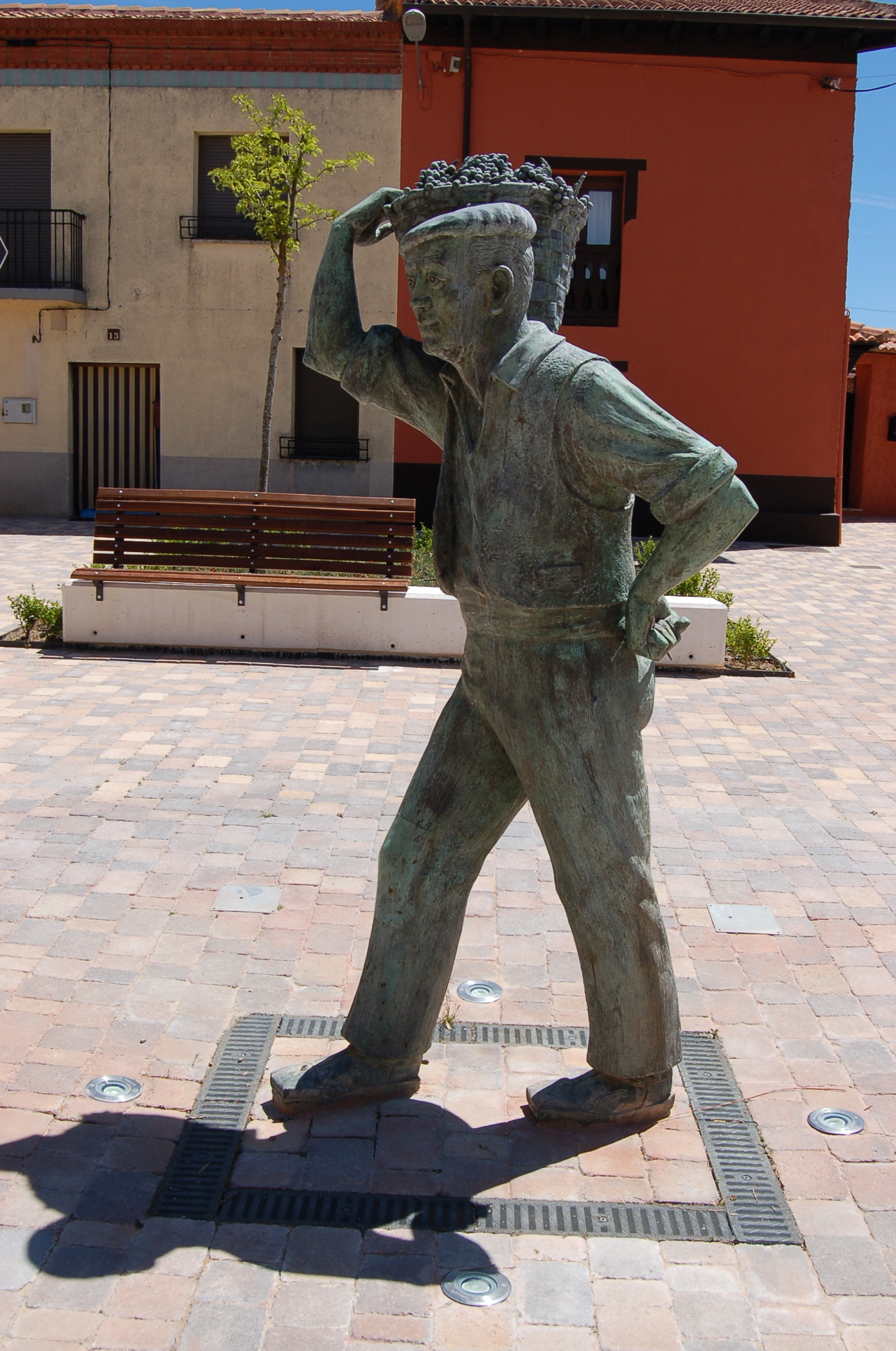 Escultura de home vendimando en Pedrosa de Duero